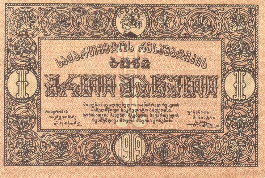 1 maneti